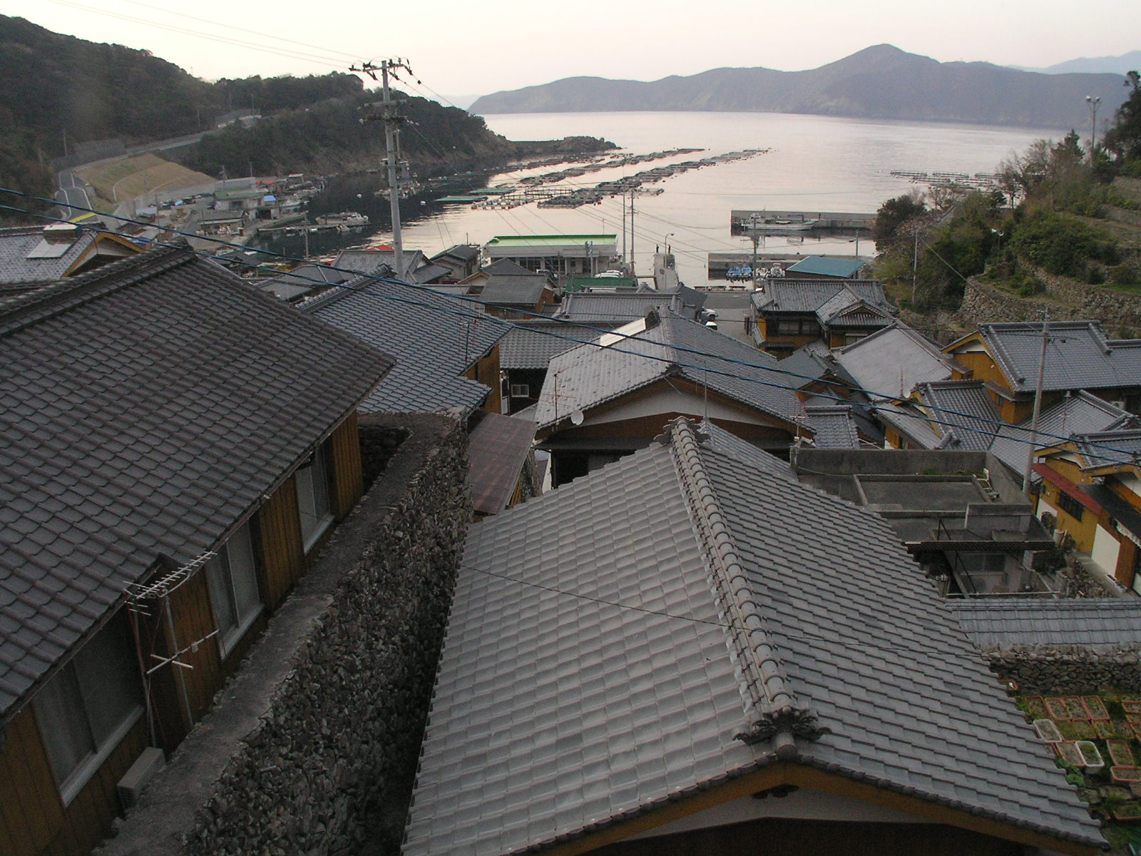 愛媛県南宇和郡愛南町外泊